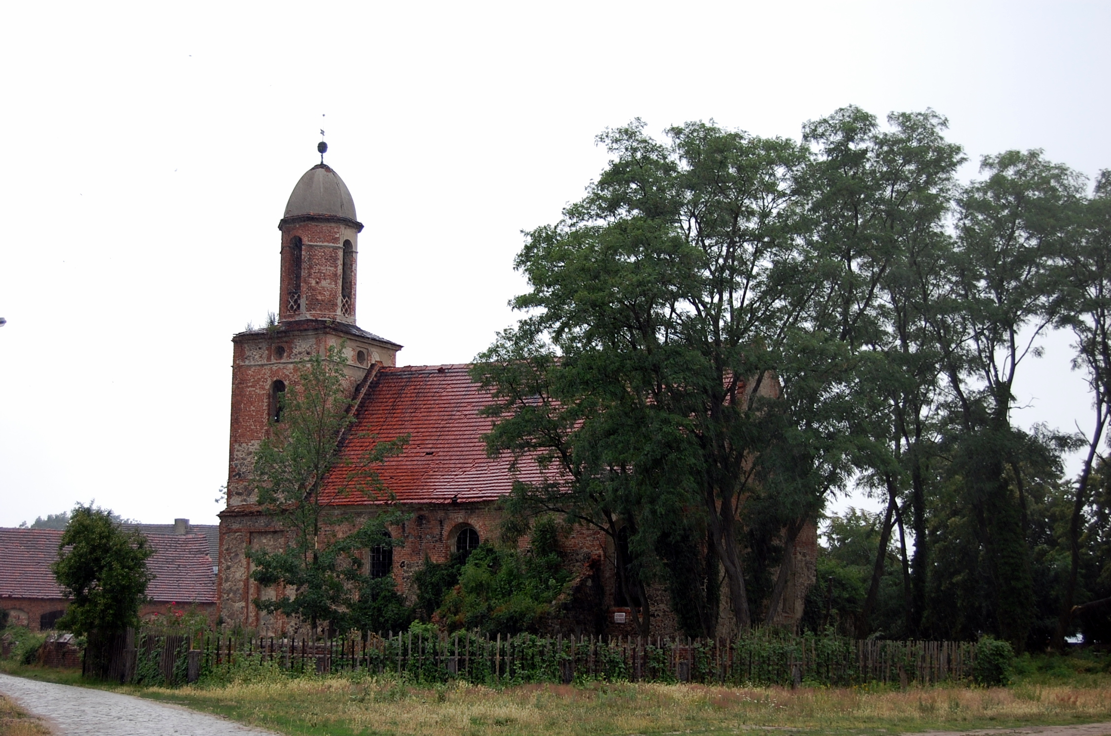 Jeziory Dolne, zespół kościoła ewangelickiego, XVII, 1818